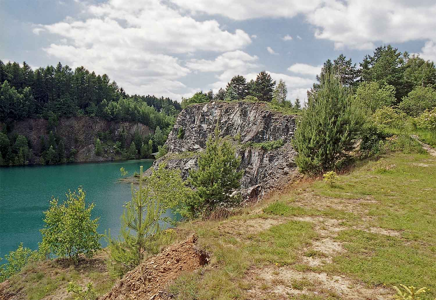 Natural monument Borecká skalka, district Havlíčkův Brod autor: Prazak date: 2005